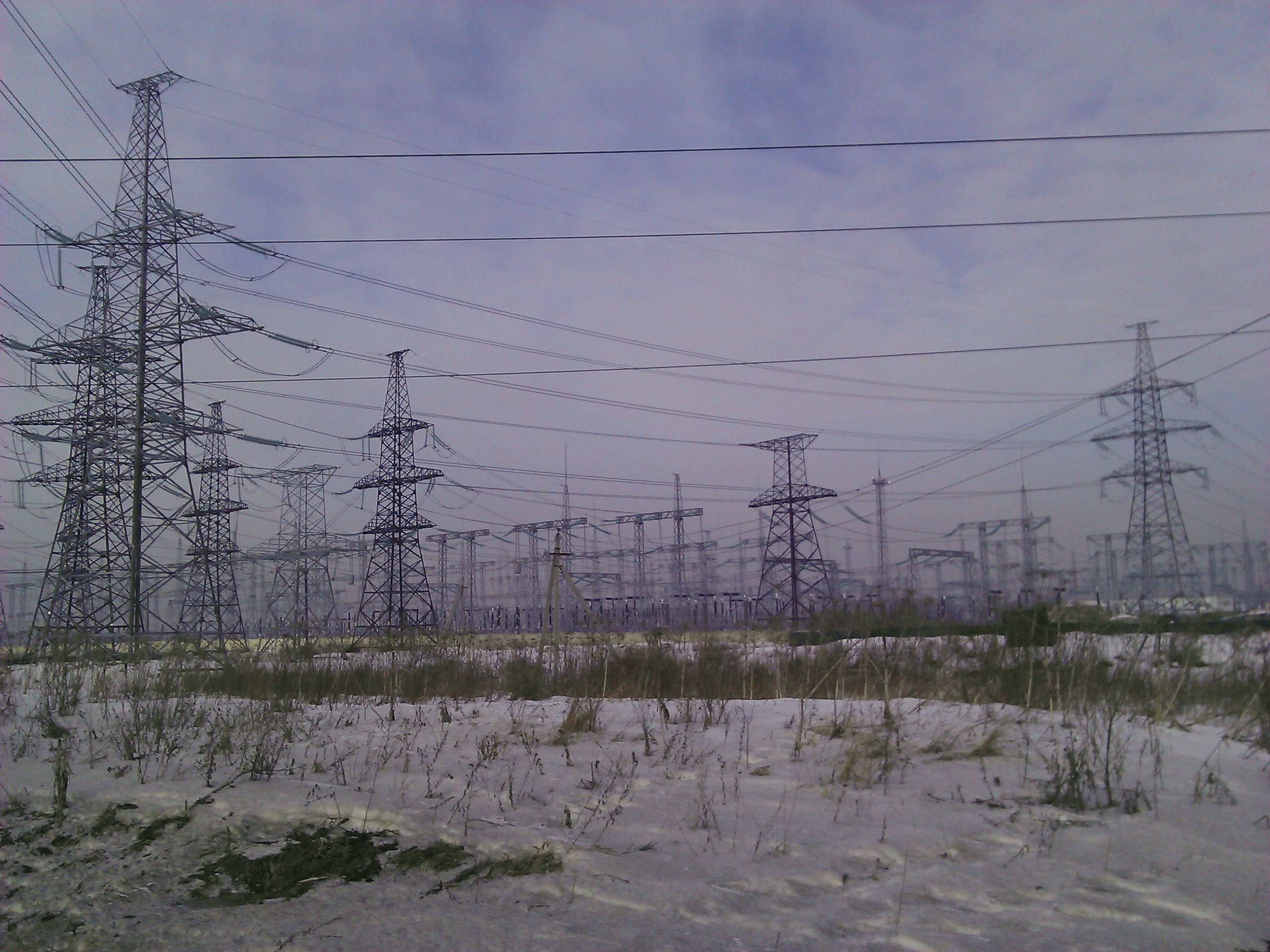 Подстанция Восточная, Ленинградская область.